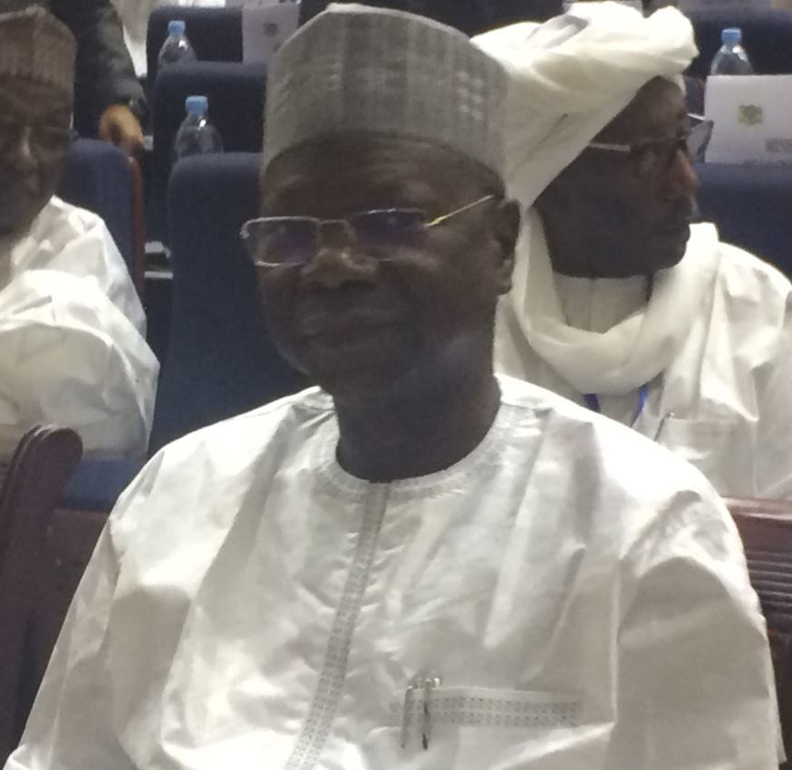 Kalzeubé Pahimi Deubet, ministre d'Etat et secrétaire générale de la présidence à N'Djamena, le 27 octobre 2018.